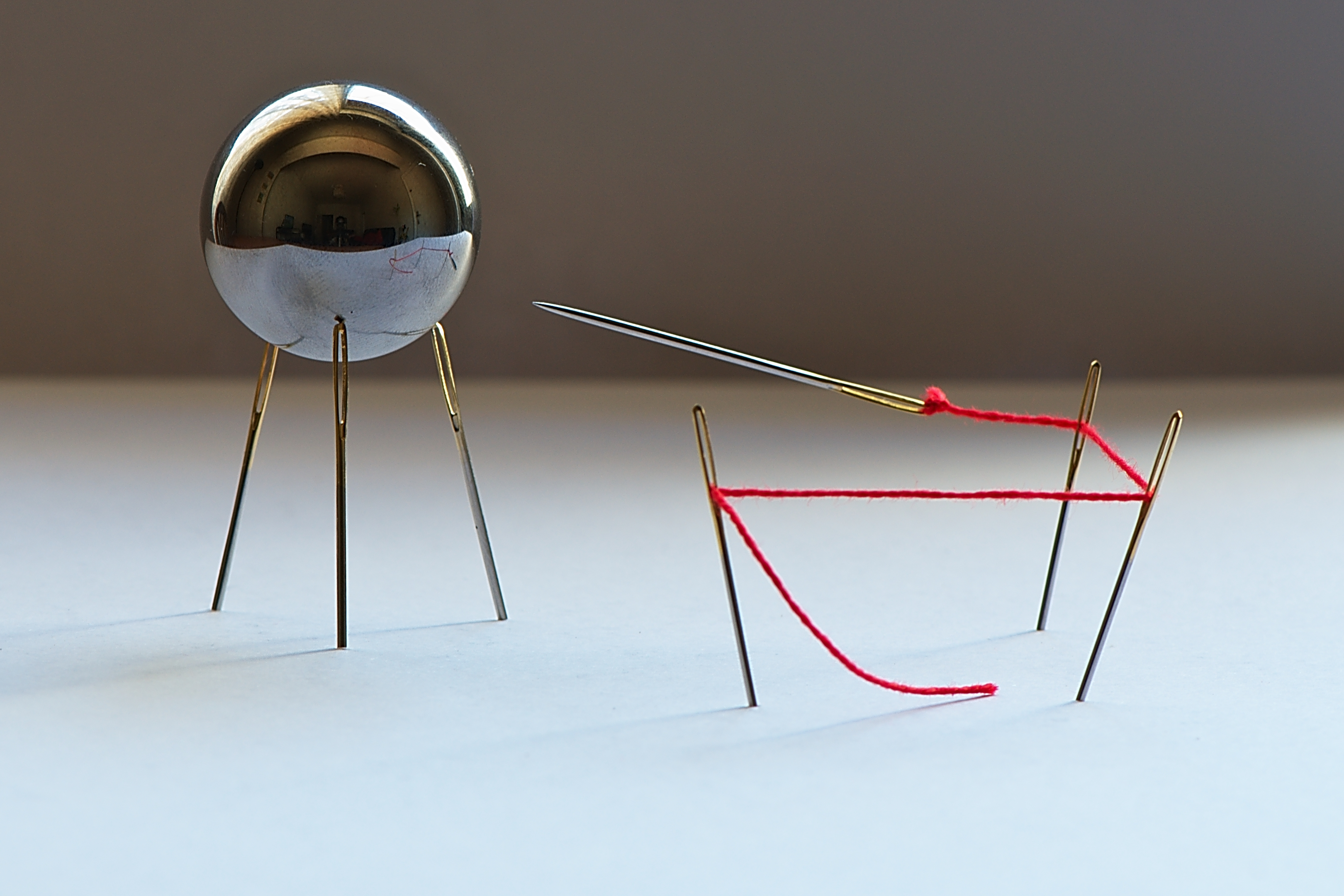 Equilibrium: force